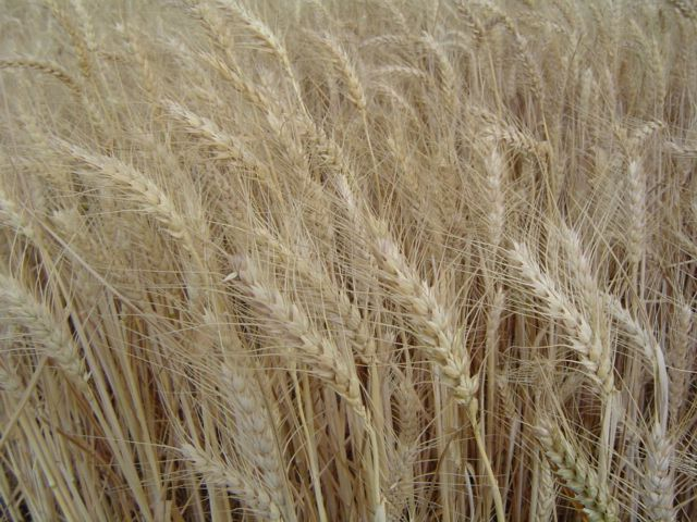 (Triticum durum).Campo de trigo, Valle de Amblés, Ávila, Spain